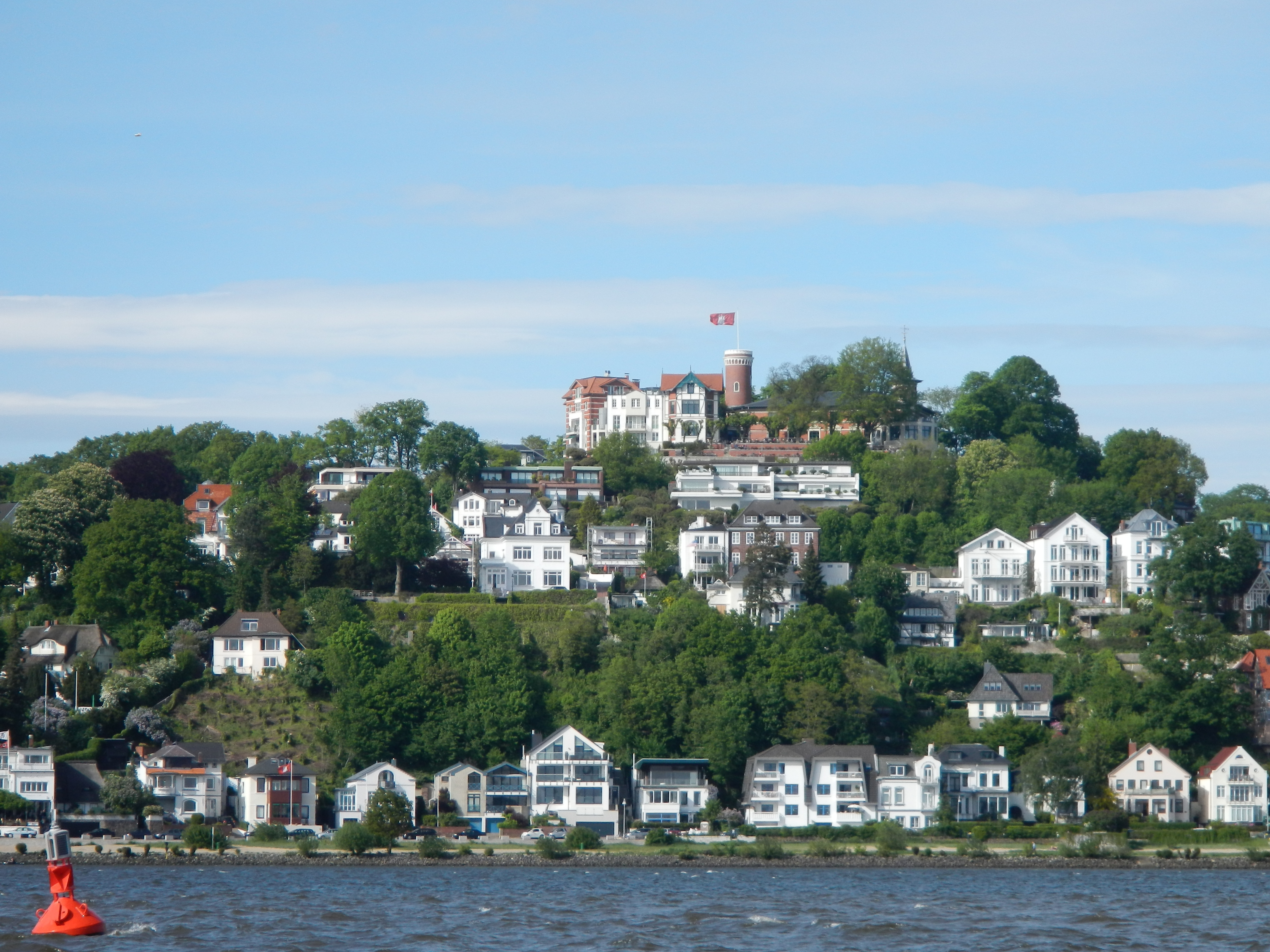 Der Süllberg in Hamburg-Blankenese